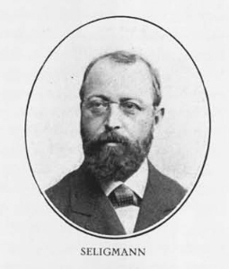 Der deutsche Bankier Moritz Seligmann ( (1840–1915)